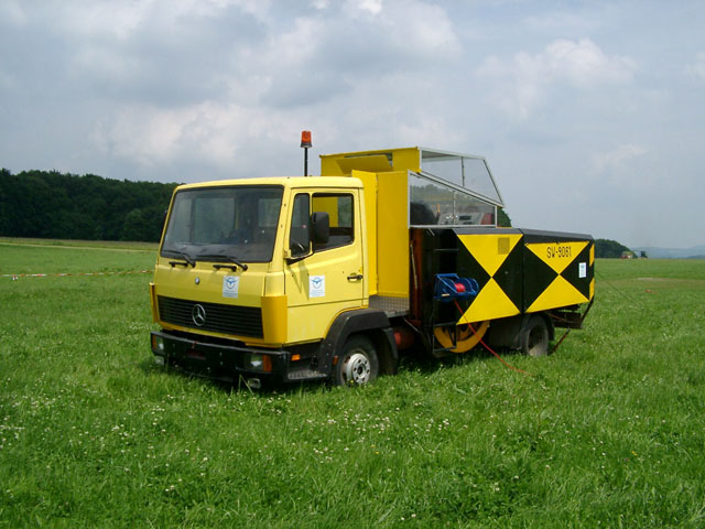 Segelflugzeug-Startwinde der FTAG.